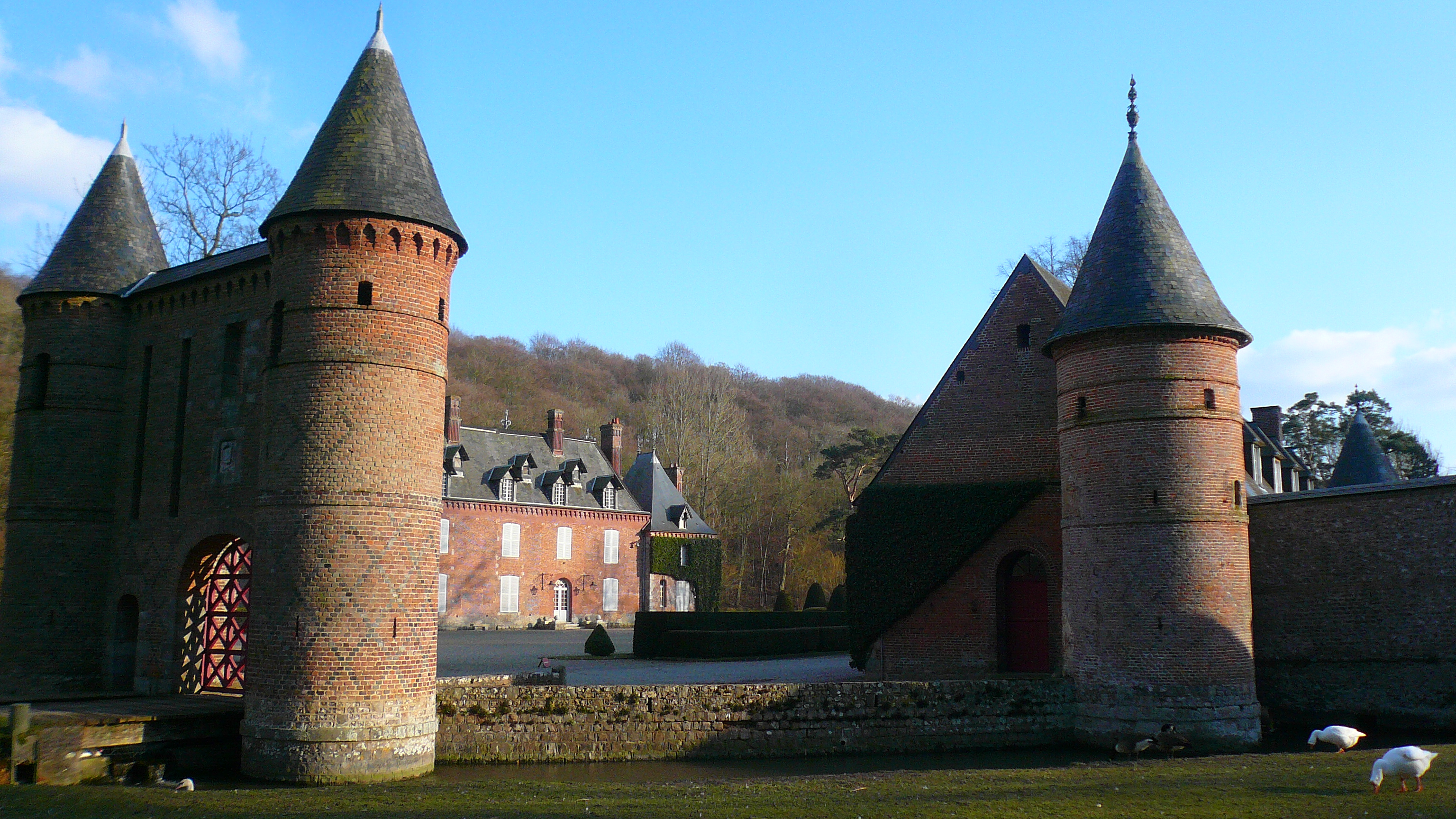 Château d'Imbleville